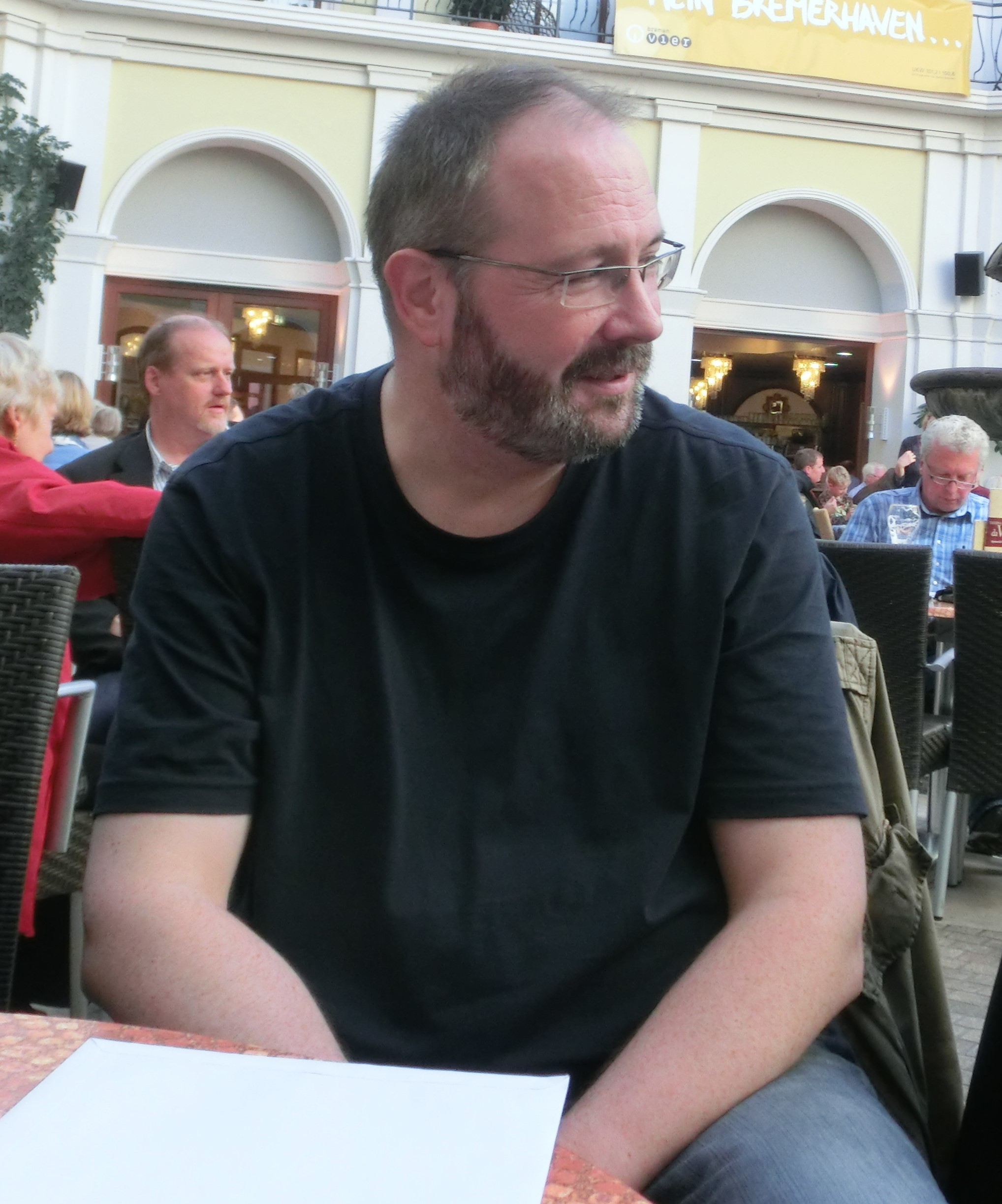 Der Flaggenkundler Jörg Karaschewski auf dem Deutschen Vexillologentag 2015 in Bremerhaven.